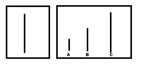 L’expérience de Asch sur le conformisme